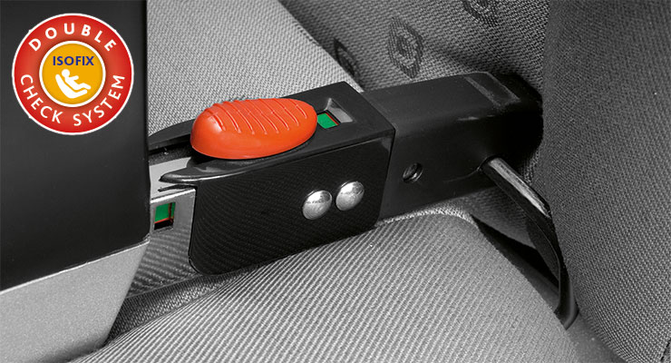 Bras isofix d'un siège auto